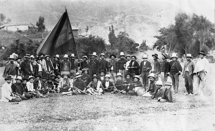 Combattants conservateurs avant la bataille de Palonegro, durant la Guerre des Mille Jours